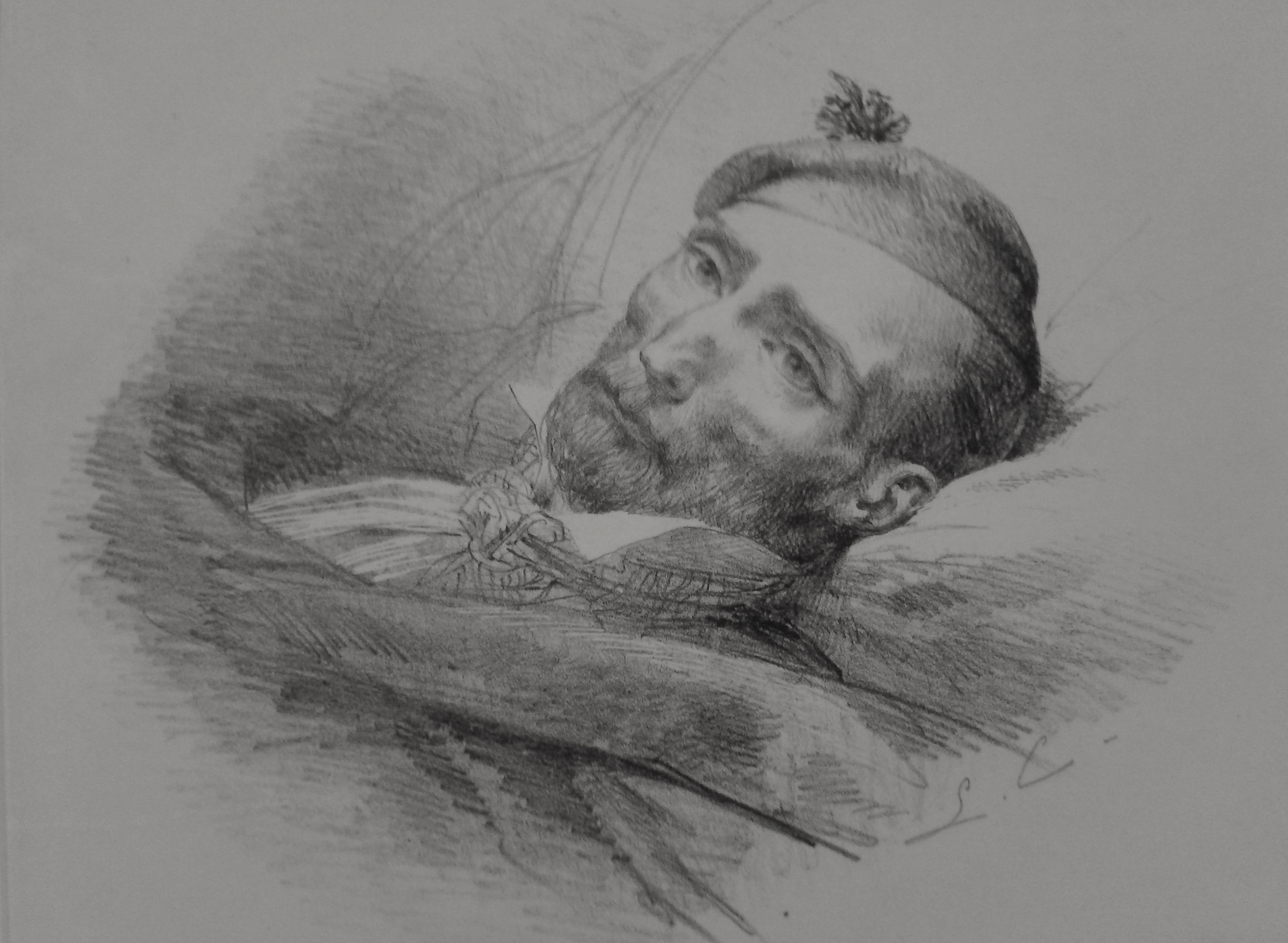 Lithographie de Léon Cogniet (1794-1880) -1823 représentant Géricault mourant.